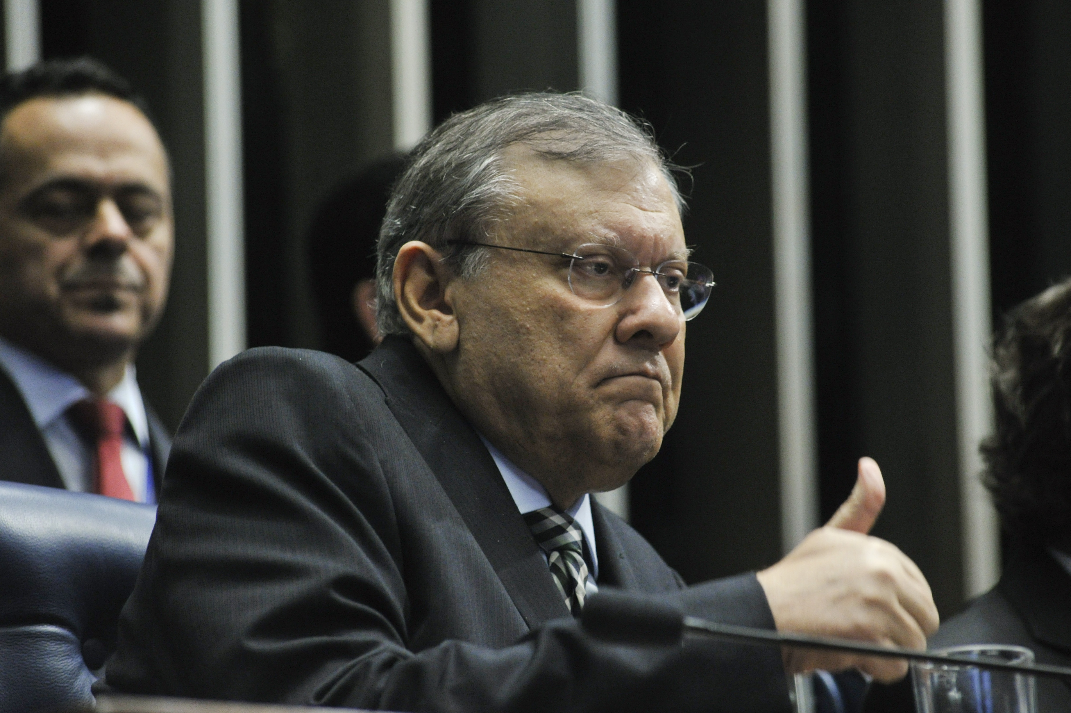 Plenário do Senado Federal durante sessão especial destinada a comemorar os 100 anos de fundação do Hospital Amaral Carvalho. À mesa, jornalista Milton Neves. Foto: Geraldo Magela/Agência Senado